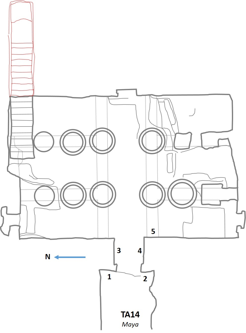 Planimetria schematica della Tomba dei Nobili TA14 di Amarna